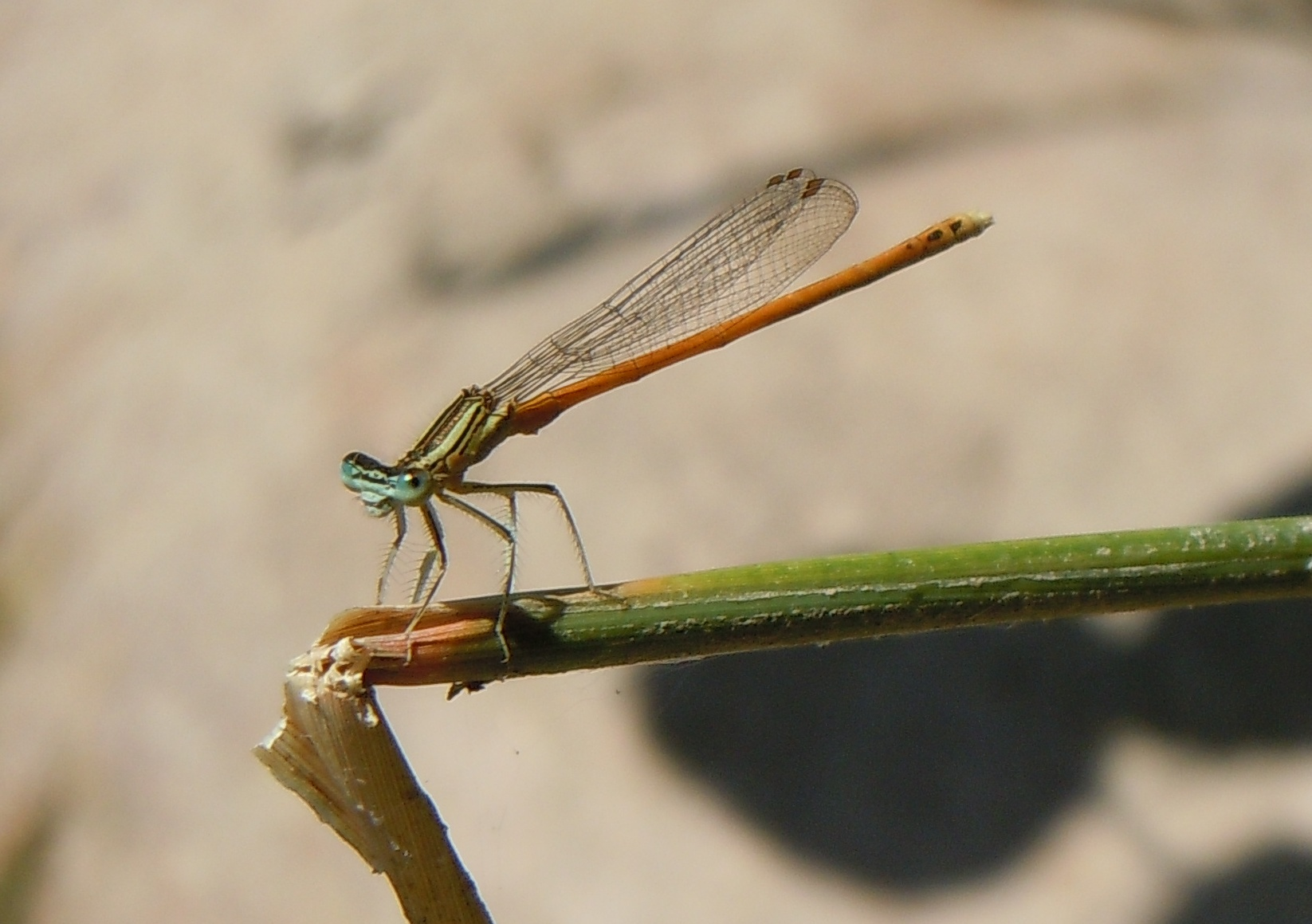 Platycnemis acutipennis - Agrion Orangé - Ardèche - France